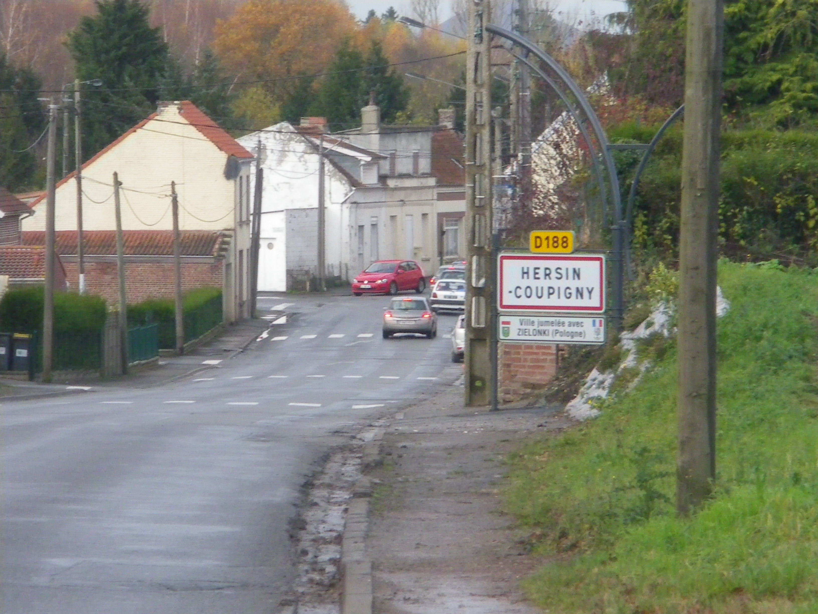 Vue d'un panneau d'entrée de Hersin-Coupigny, depuis la commune de Sains-en-Gohelle.